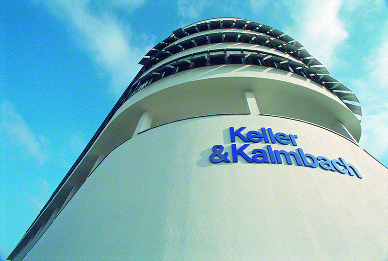 Das Stammhaus von Keller & Kalmbach in Unterschleißheim bei München